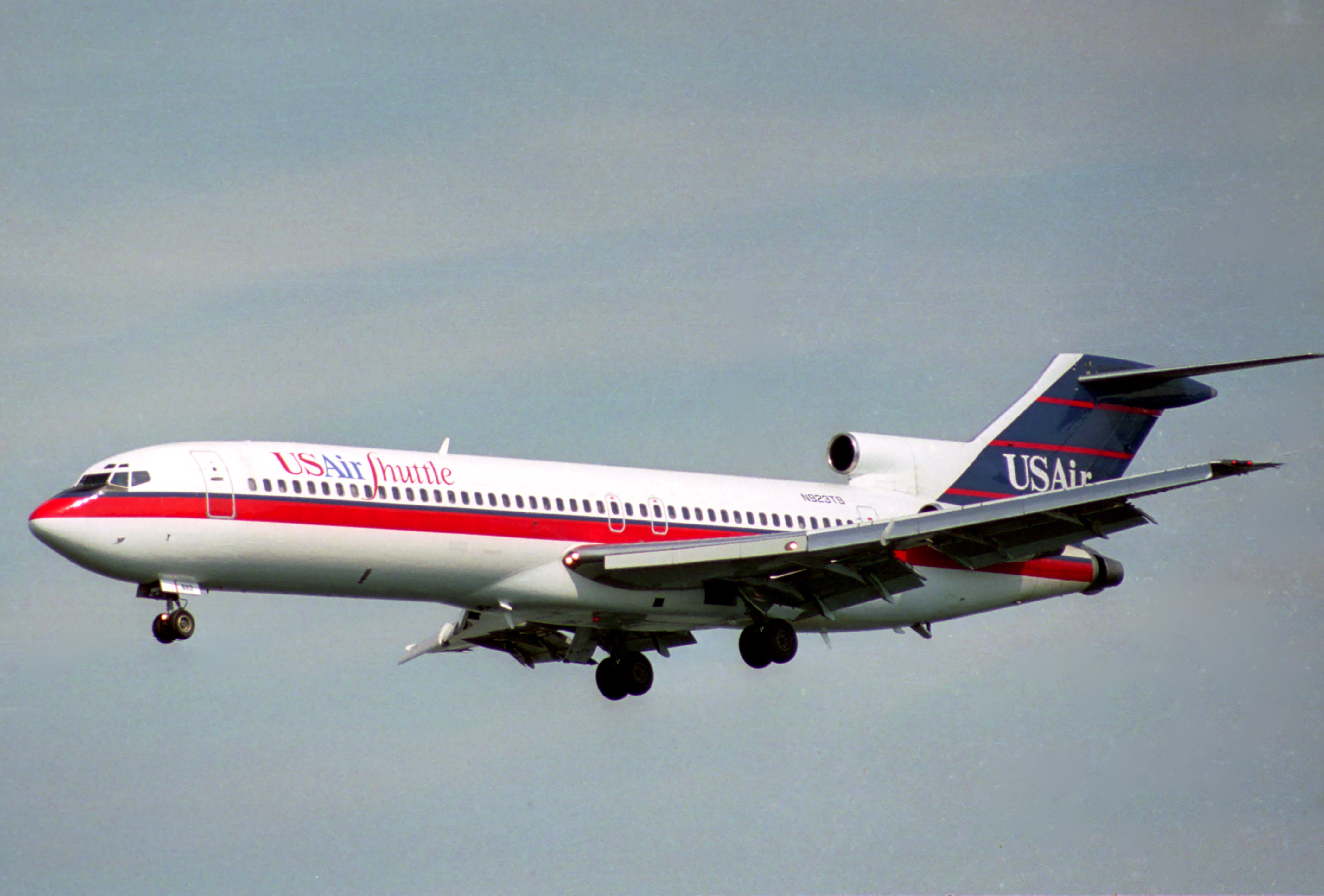 USAir Shuttle Boeing 727-254; N923TS@DCA;19.07.1995